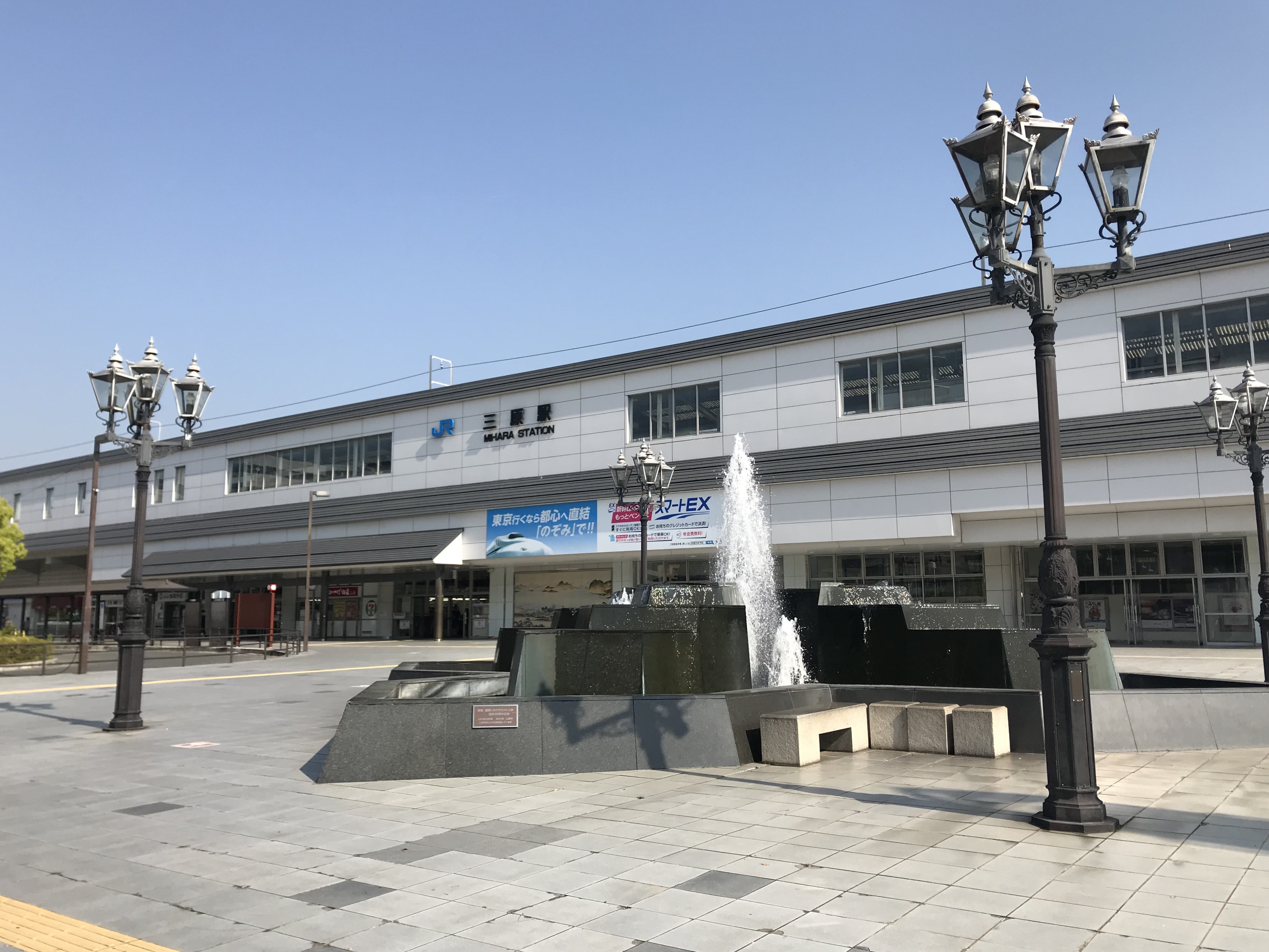 三原駅の駅舎